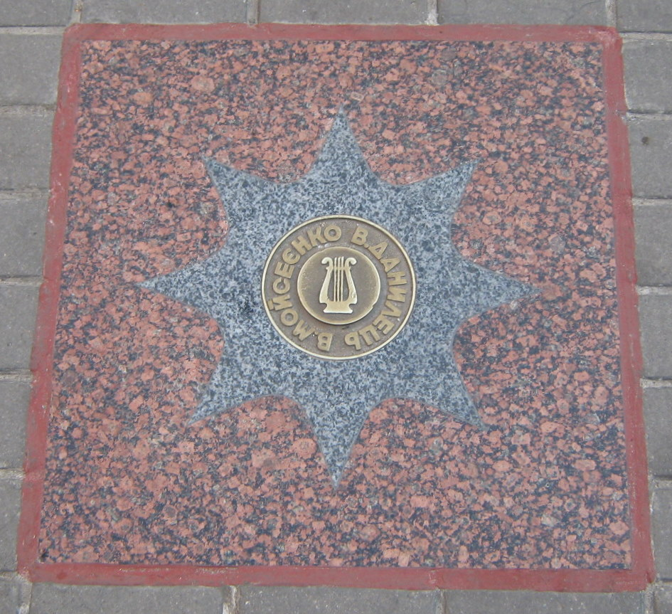 Зірка Володимира Мойсеєнка і Володимира Дантльця на Алеї Зірок в Києві